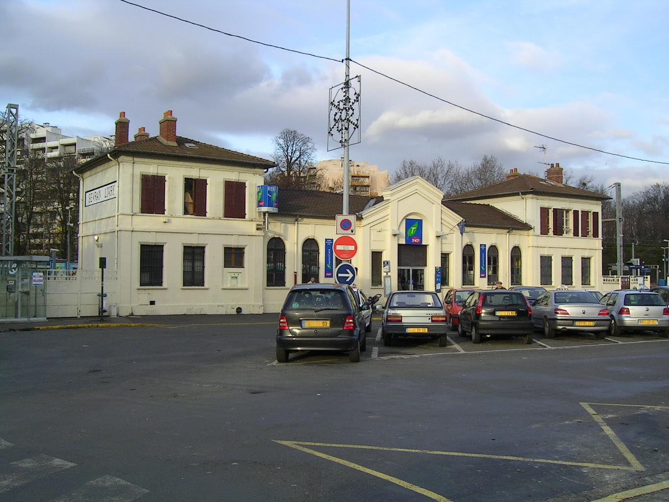 Sevran-Livry - Façade du bâtiment de la gare Sevran (Seine-Saint-Denis) Décembre 2006 Photo personnelle (own work) de Marianna